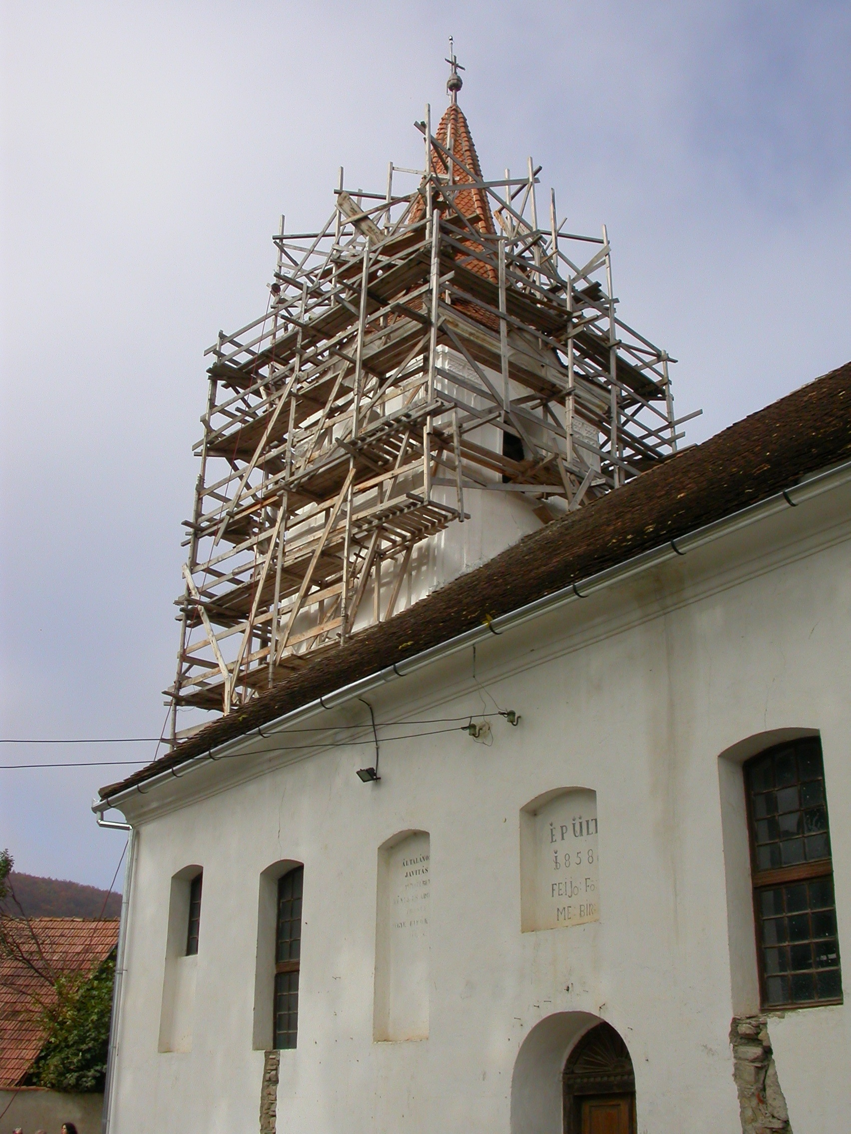 Ansamblul bisericii romano-catolice "Zămislirea Sf. Fecioare", sec. XV - XIX